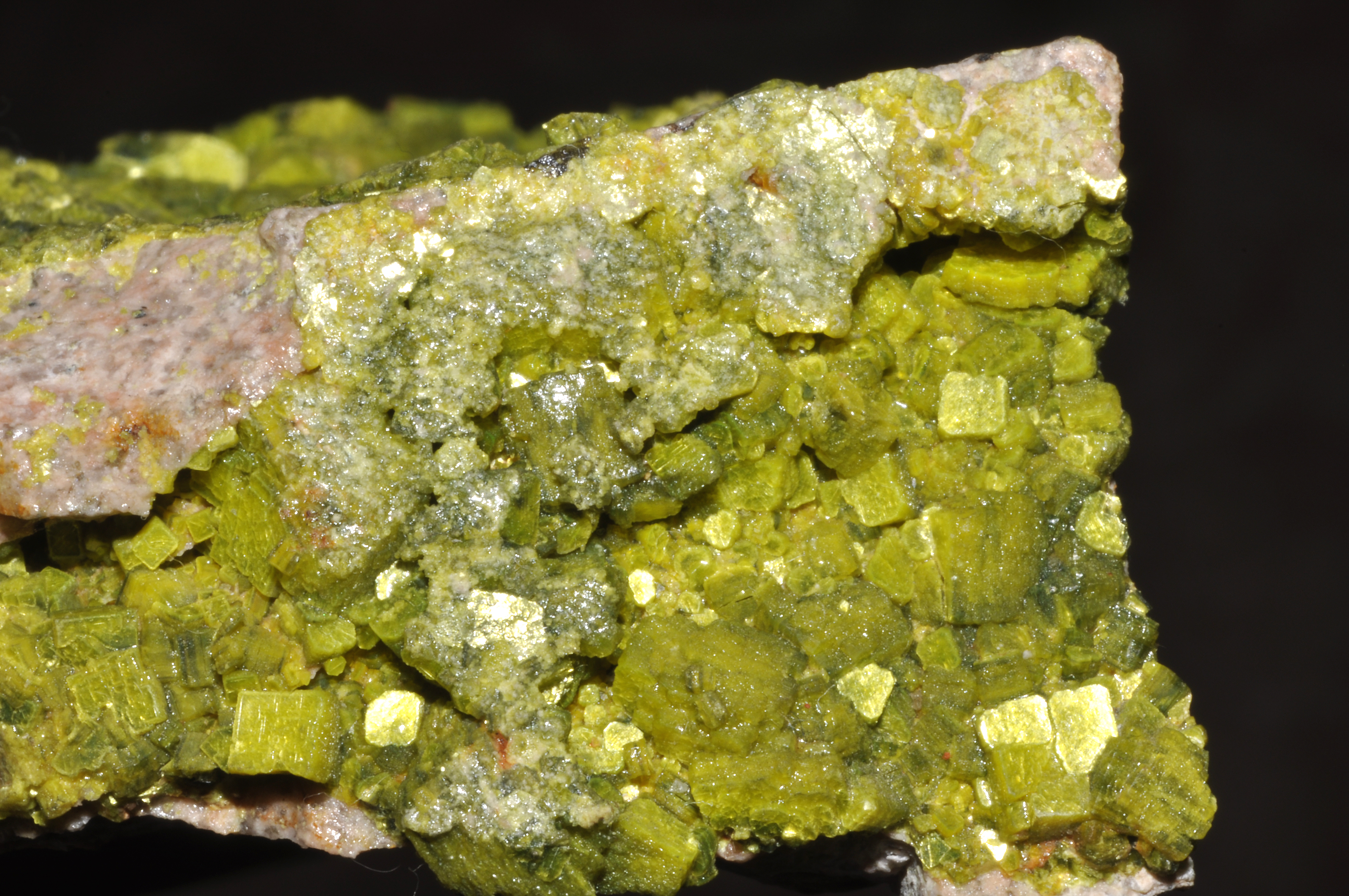 autunite : Les Oudots Mine, Issy-l’Évèque, Saône-et-Loire, Bourgogne, France